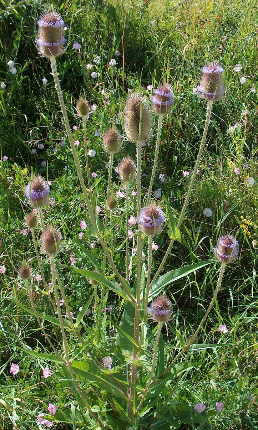 blühende Karde